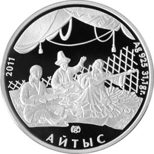 Памятная монета Республики Казахстан «Айтыс» из серии "Обряды, национальные игры Казахстана" - 500 тенге 2011 - серебро